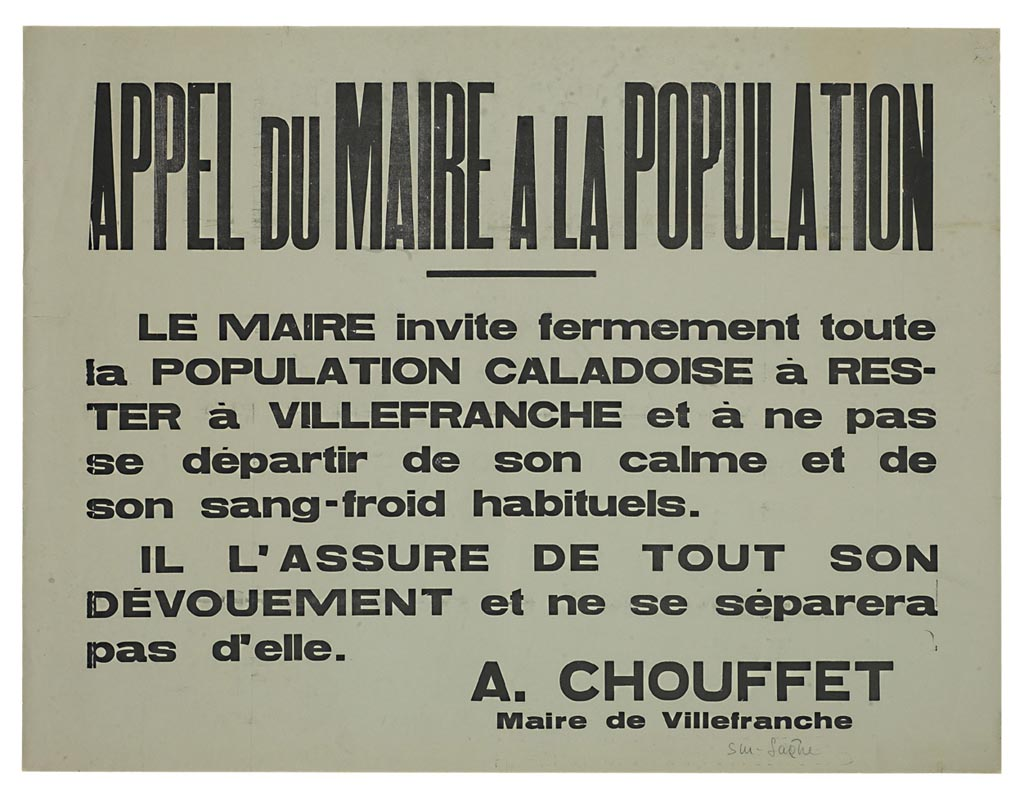 Appel du maire Armand Chouffet